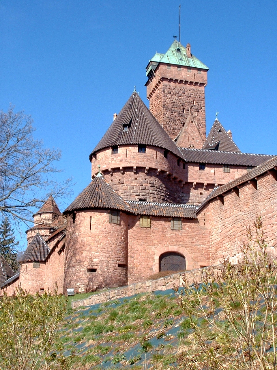 Hohkönigsburg, Elsass